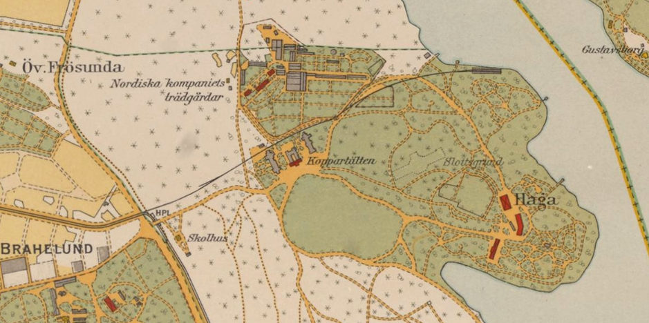 Del av "detaljerad karta över Stockholm med omnejd. Upprättad mellan 1917 och 1934" visande norra delen av Hagaparken med industrispåret.